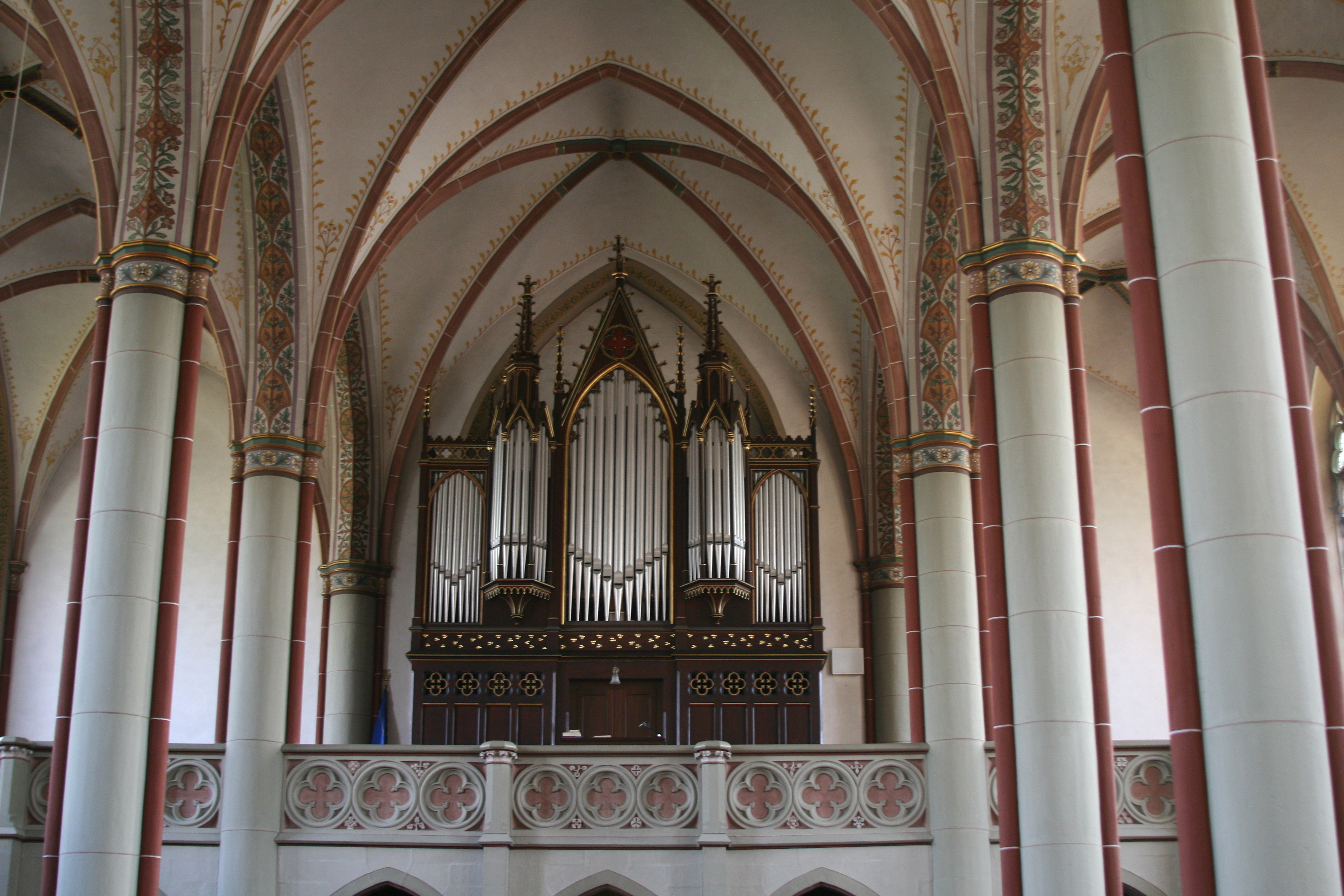 St. Mauritius (Hattingen), Stahlhutorgel für Musik der Romantik und Modernen